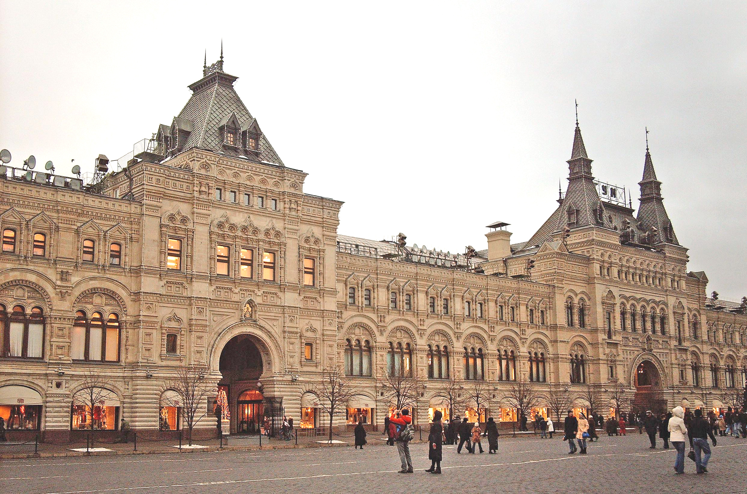 ГУМ, Москва